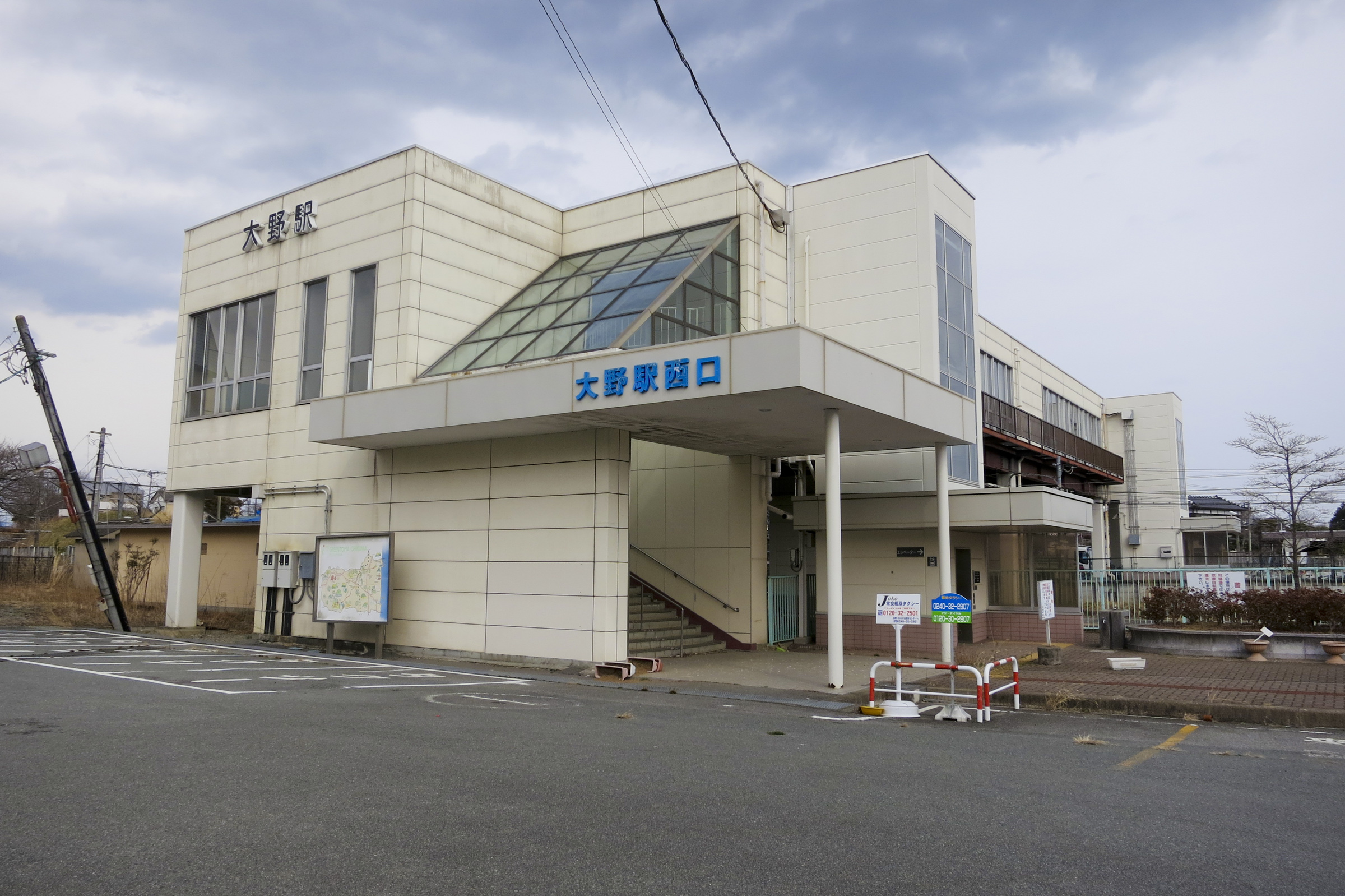 東日本旅客鉄道常磐線大野駅（東日本大震災以後の様子）